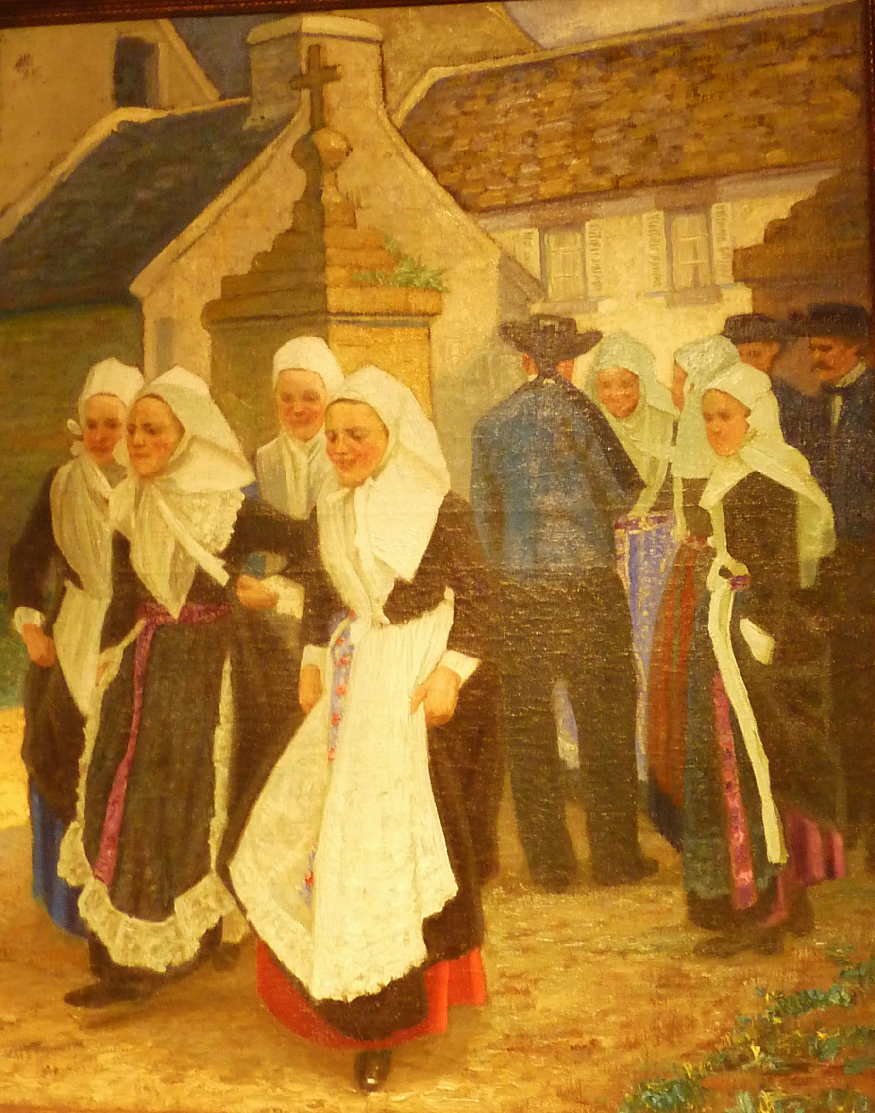 L'arrivée des fiancés à Plougastel en 1914 (par John Niemeyer) (Musée de la fraise et du Patrimoine de Plougastel-Daoulas)